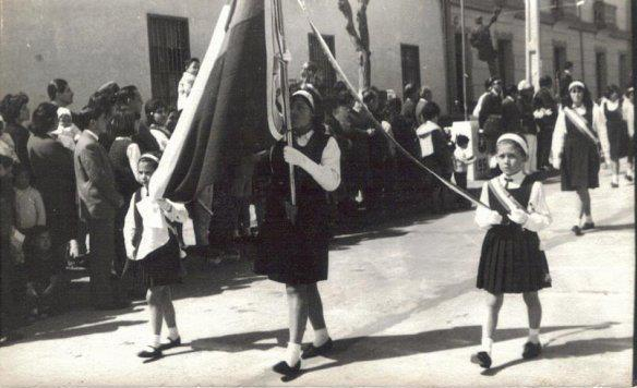 Niñas estudiantes de la Escuela Doctor Eugenio Díaz Lira (actual Colegio de la Preciosa Sangre) de Pichilemu participando del desfile cívico patriótico, realizado cada 18 de septiembre, en los años 1960.